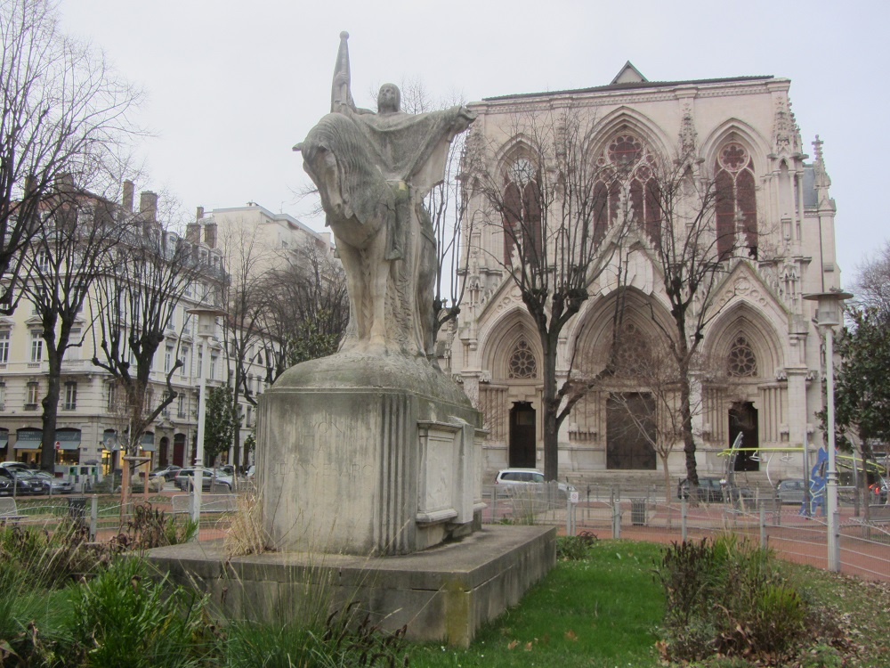 La statue de Jeanne d'Arc installée sur la place Puvis de Chavannes a été réalisée par le sculpteur Jean Chorel (1875-1946). Elle est représentée à cheval, bras levés et yeux au ciel. Elle a été remise à la Ville de Lyon et inaugurée sous la présidence d'Edouard Herriot, le 18 novembre 1928.